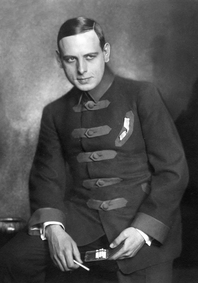 Johannes Riemann